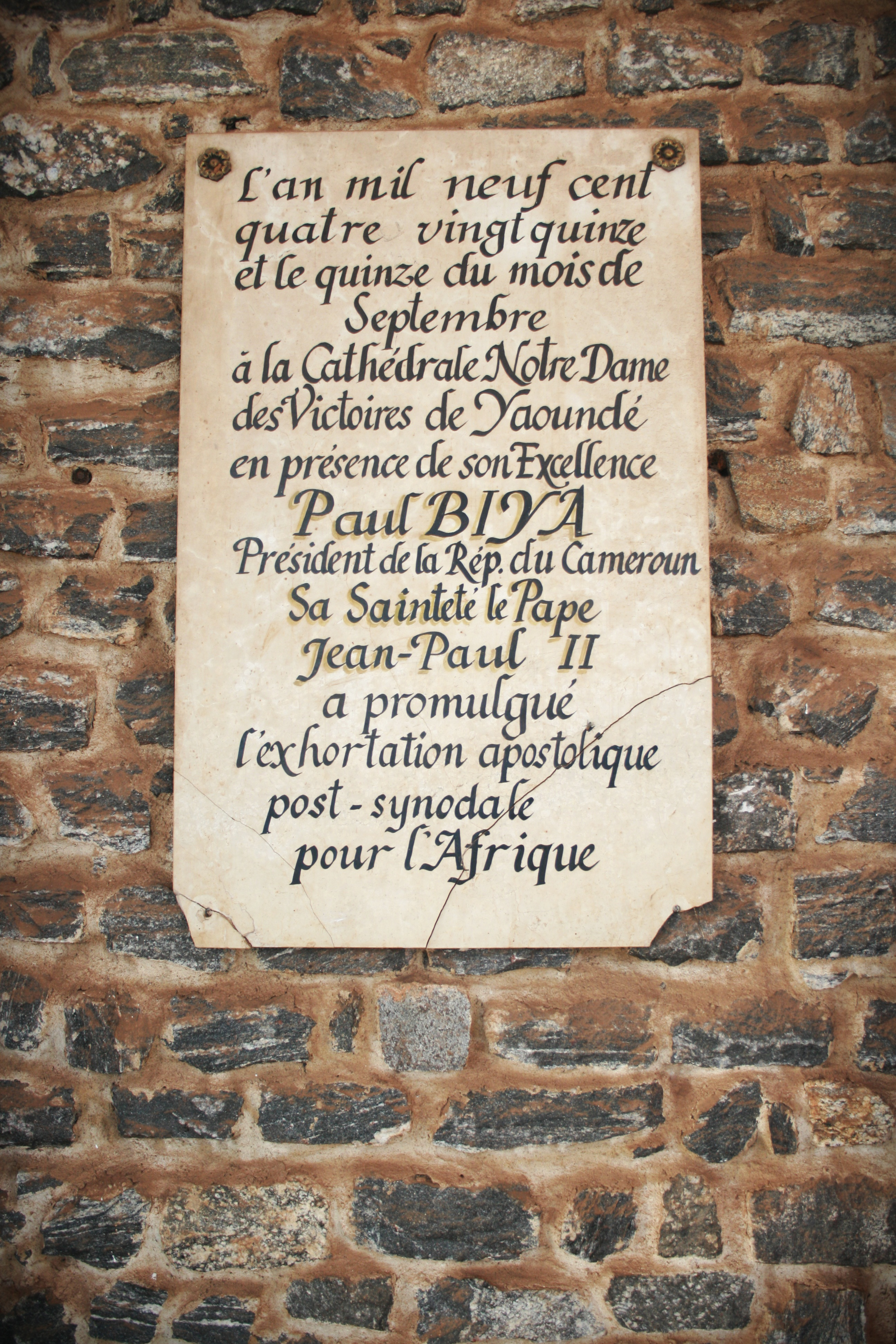 Cathédrale Notre Dame de Victoire de Yaoundé